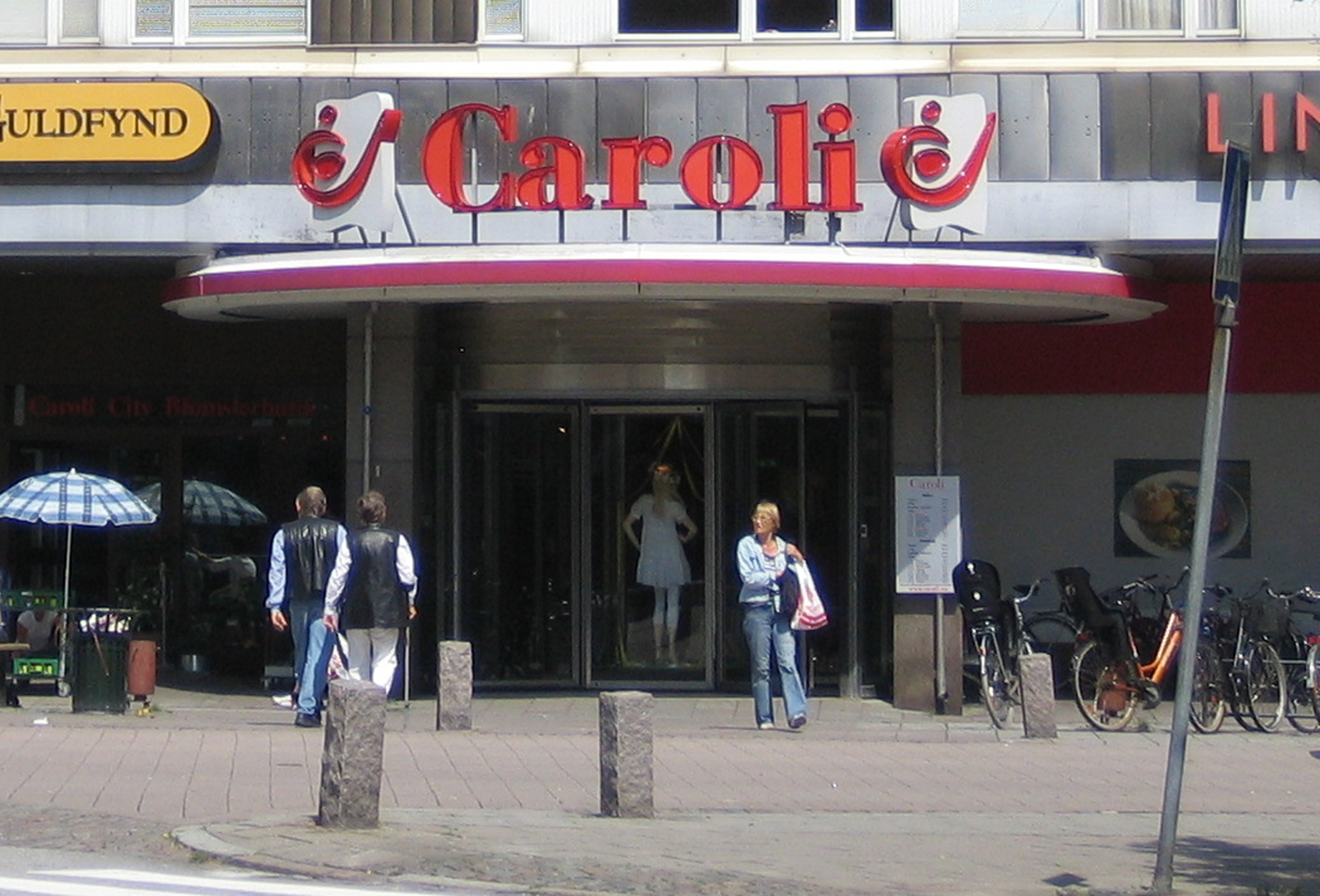 Caroli city shopping mall, Malmö